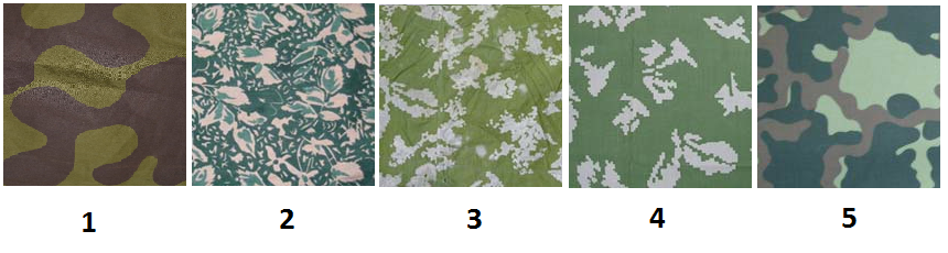 камуфляжные рисунки